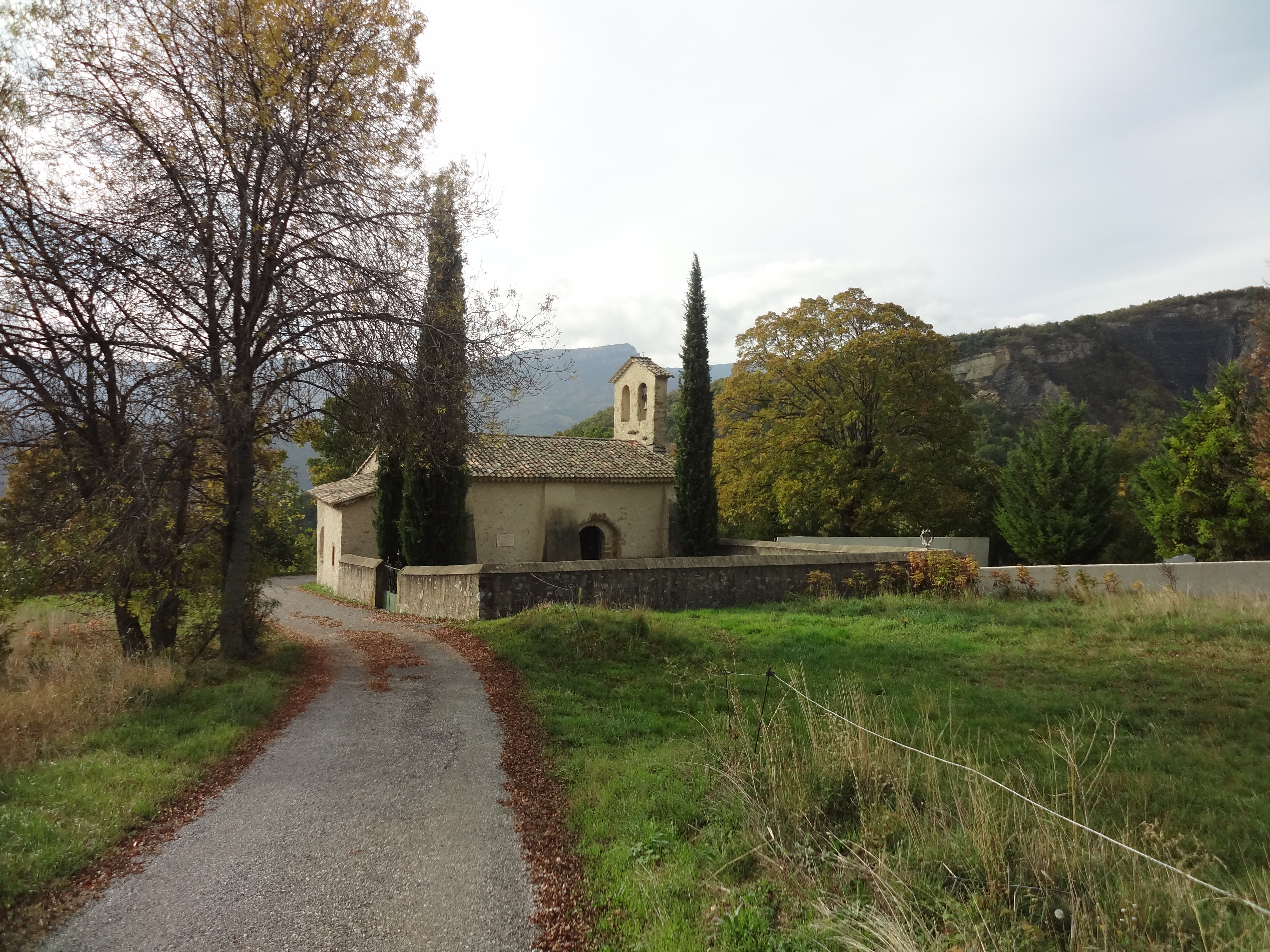 Église Saint-Gervais-Saint-Protais de Bevons, vue du nord